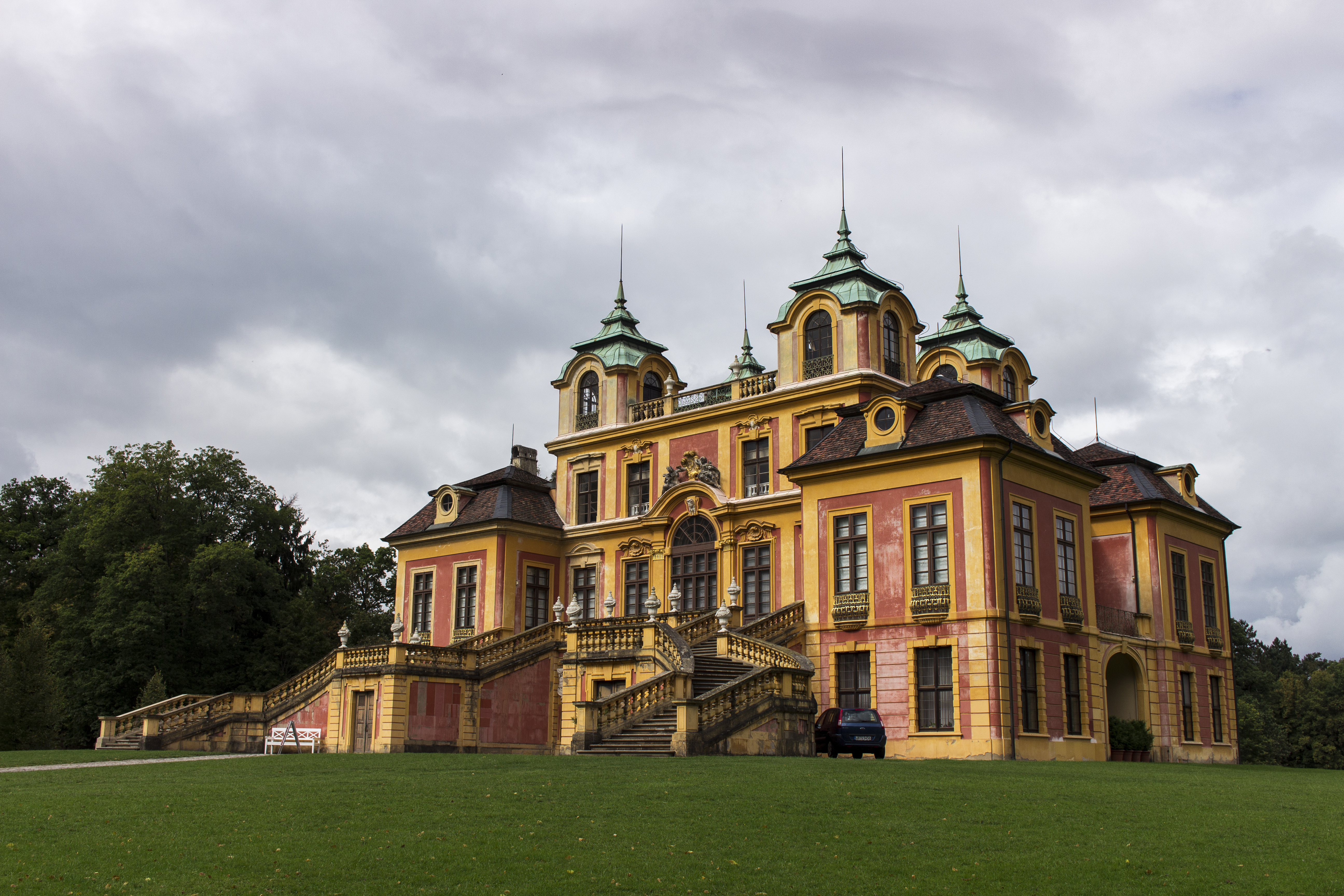 Auf diesem Bild sehen Sie das Schloss Favorite in Ludwigsburg in Baden-Württemberg. Das Schloss Favorite liegt auf einer Anhöhe im Favoritepark nördlich des Residenzschlosses Ludwigsburg.